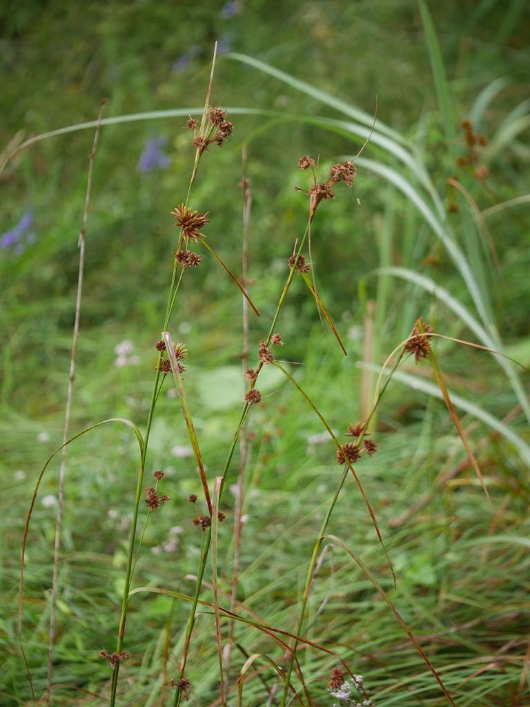 Scirpus fuirenoides：コマツカサススキ 2018/09/15 和歌山県紀の川市：Kinokawa City. Wakayama Pref. Japan